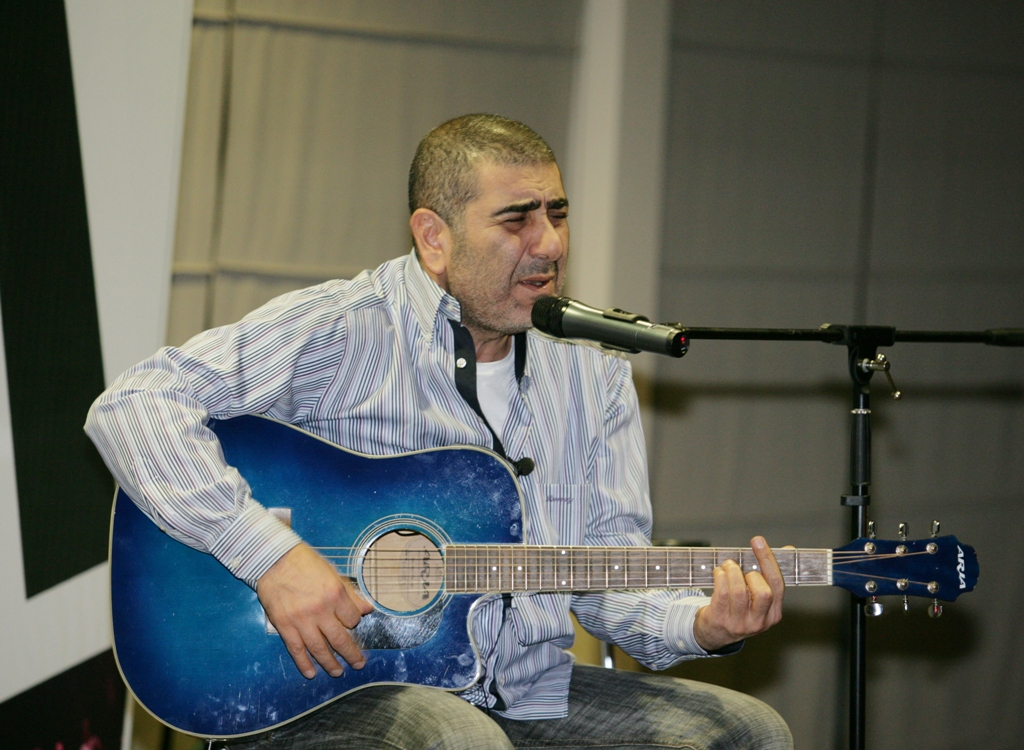 Burcu Karadağ Metin Özülkü (3)